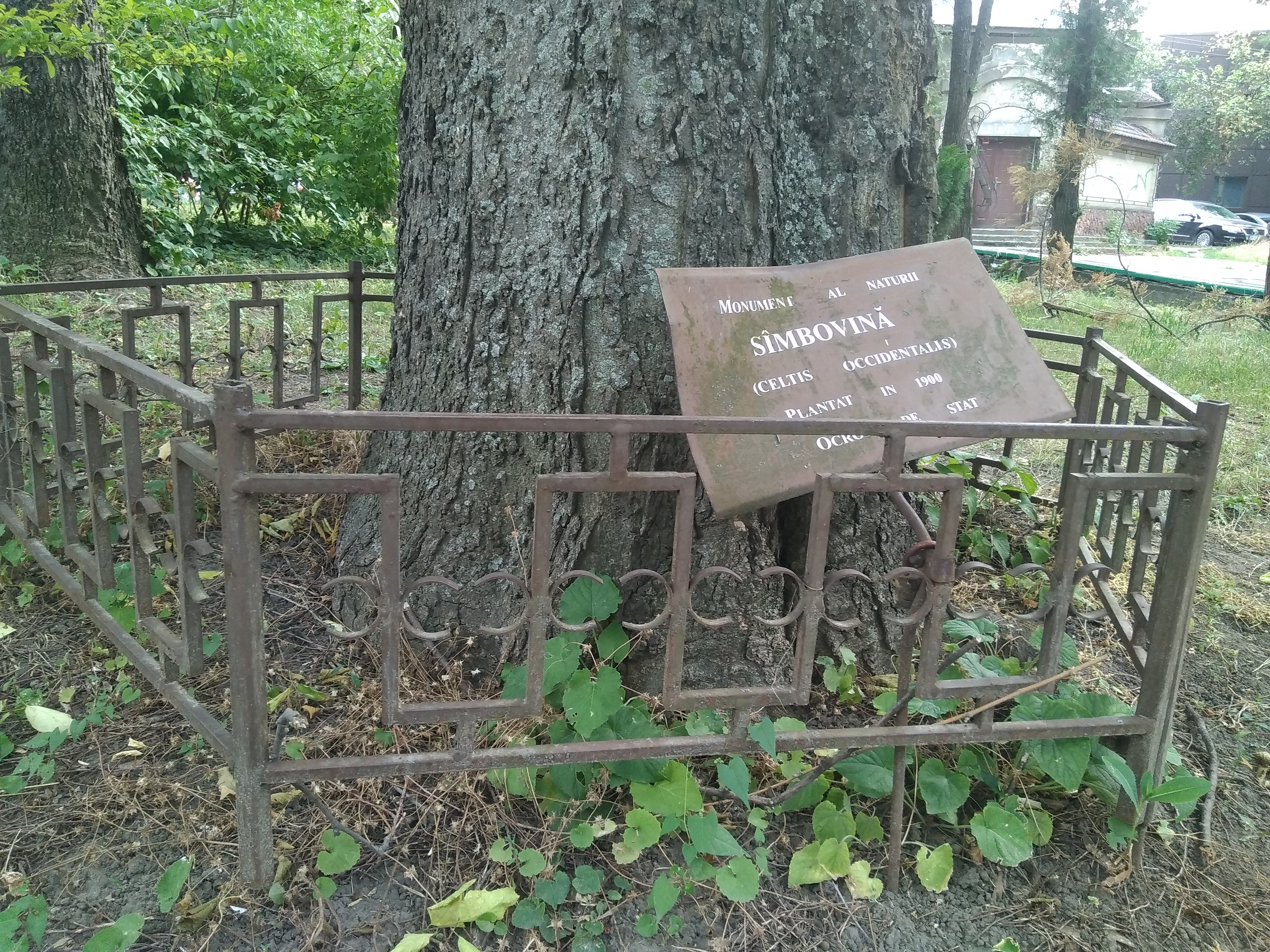 Sâmbovină, monument al naturii amplasat în mun. Chișinău, str. A. Mateevici 3, scuarul din fața Cinematografului de Vară (cod MD-C-mn.Cb-140) Cb-140